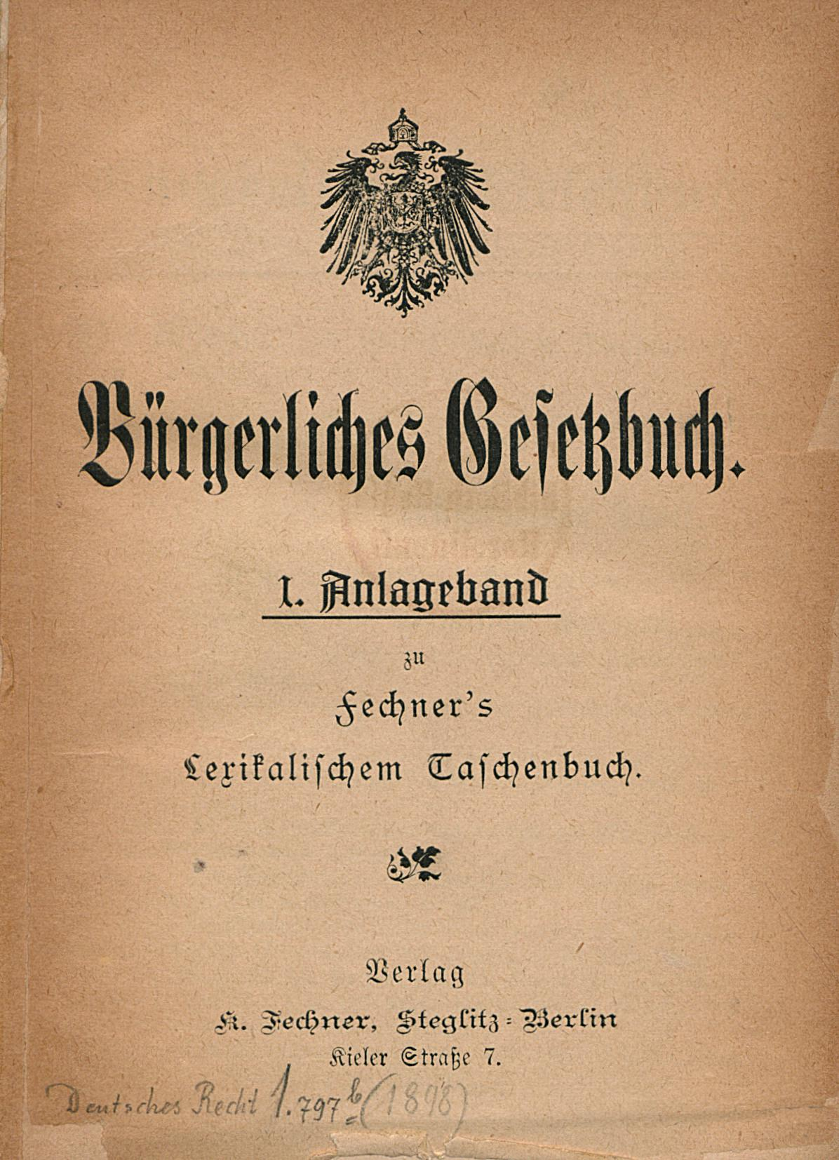 Bürgerliches Gesetzbuch ; Anlagebd. 1